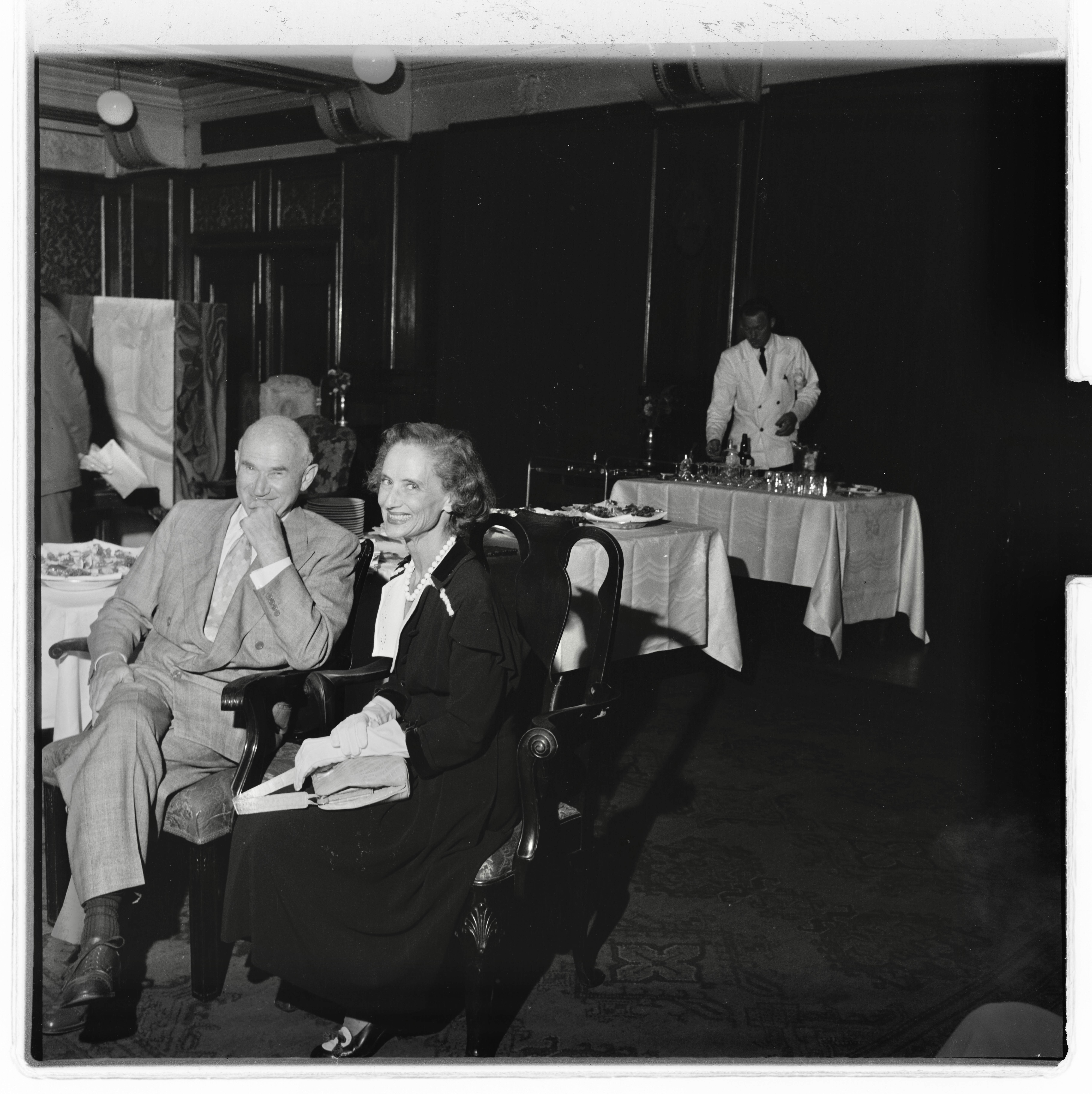 Bildet er hentet fra Arkivverket. Samuel Goldwyn og hans kone, Frances Howard. Arkivinstitusjon : Riksarkivet Arkivnavn : Billedbladet NÅ Sted : Norge, Ukjent, Ukjent, Emneord: Film, Filmskaper, Filmprodusent Avbildet